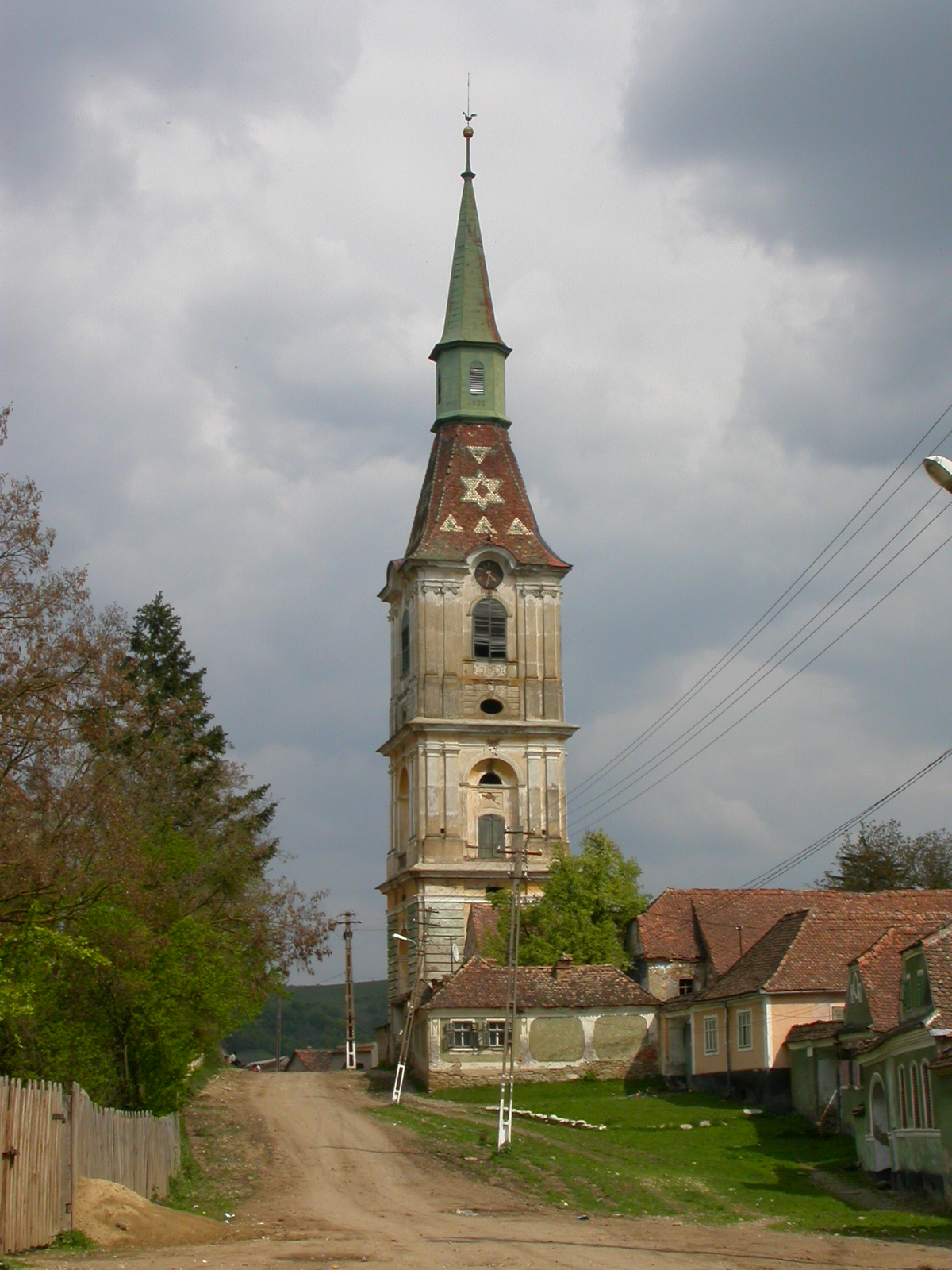 Ansamblul bisericii evanghelice fortificate, sec. XV - XIX